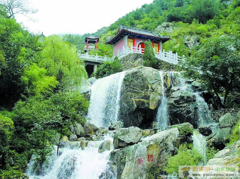 Licheng, Jinan, Shandong, China